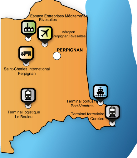 Carte représentant la plateforme multimodale Pyrénées Méditerranée